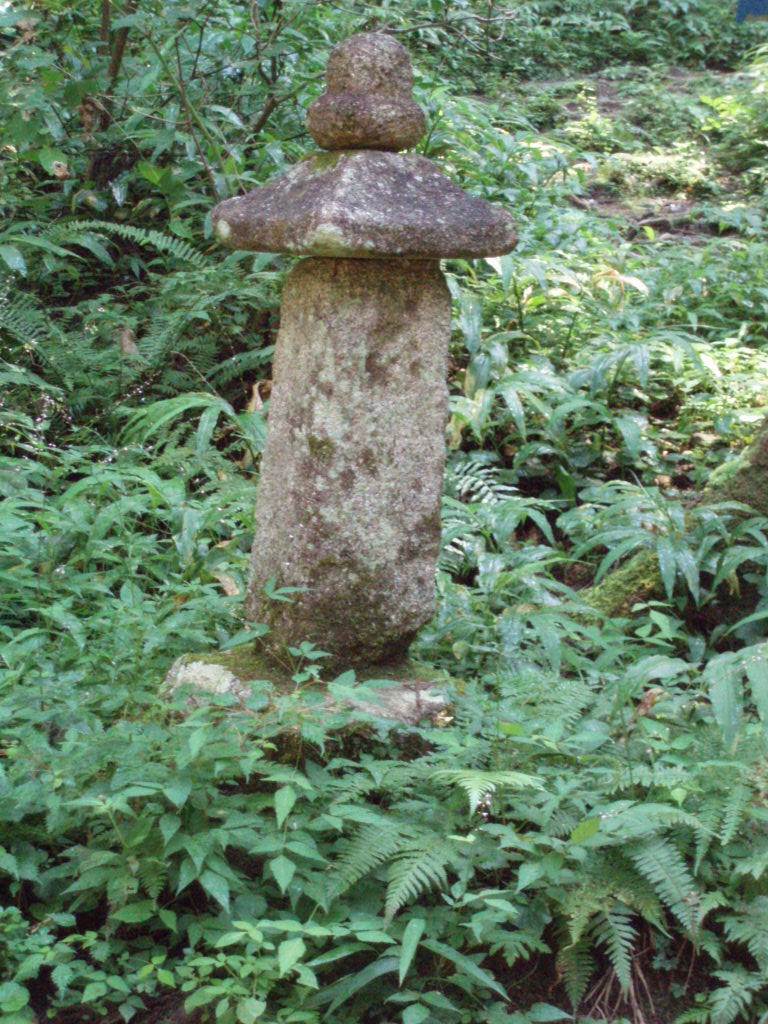 Stupa_of_OSAKAMOTO-oji_remains